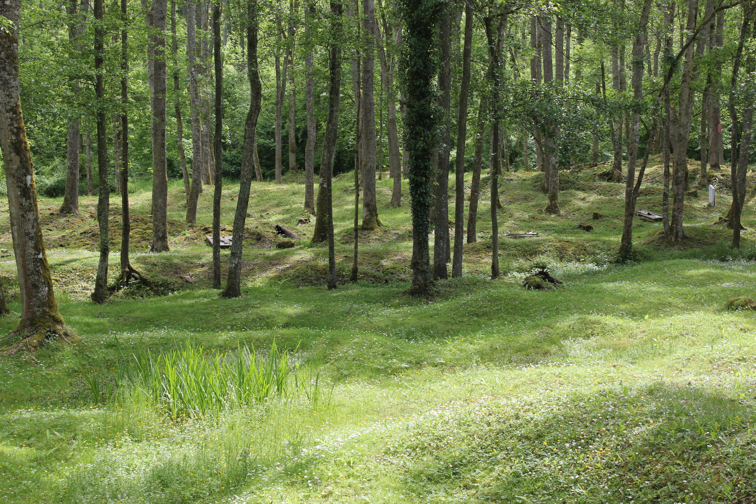 Noch immer sind auf dem ehemaligen Schlachtfeld von Verdun Explosionskrater zu erkennen, wie hier beim zerstörten Ort Bezonvaux.